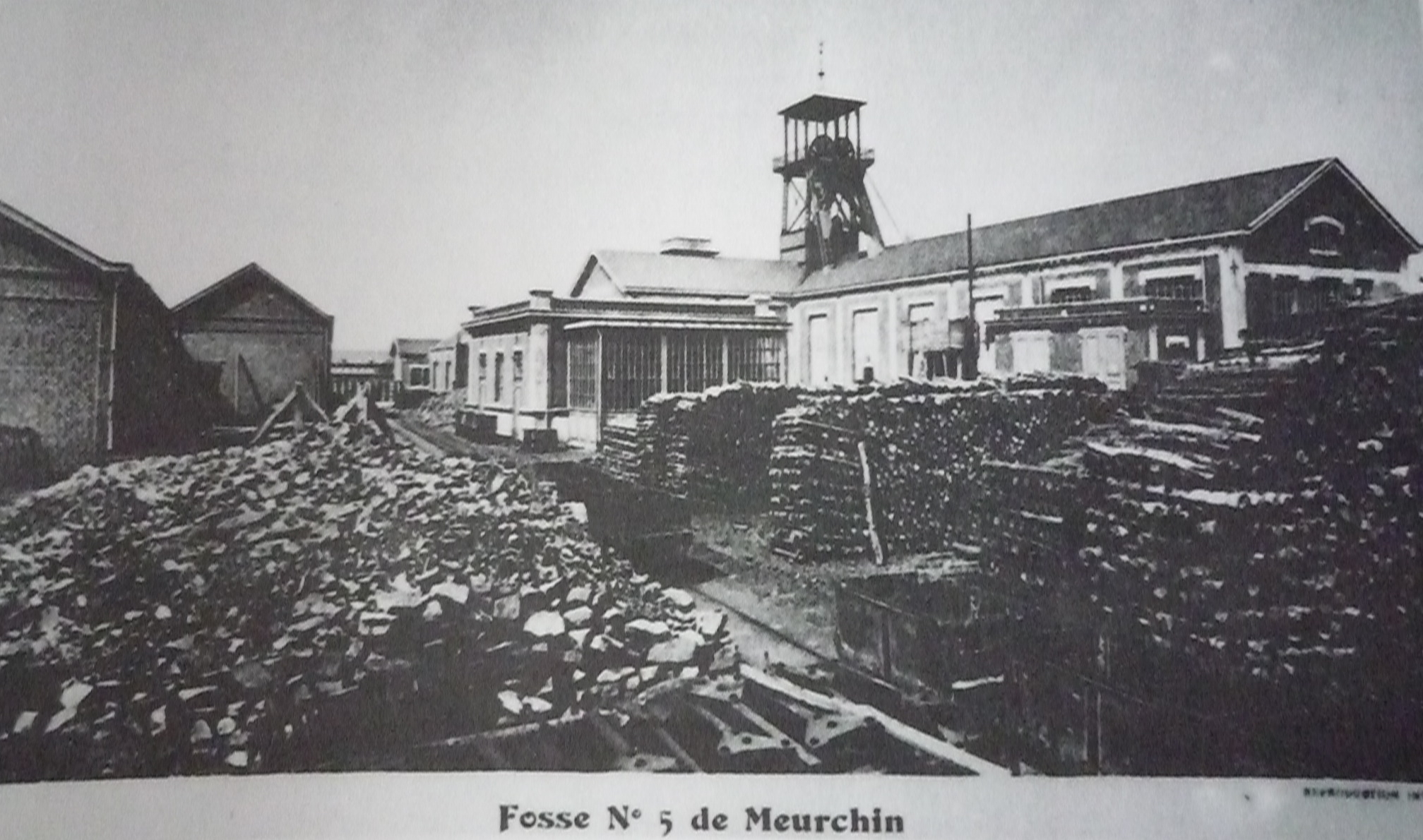 La Fosse n° 5 de la Compagnie des mines de Meurchin était un charbonnage constitué d'un seul puits situé à Billy-Berclau, Pas-de-Calais, Nord-Pas-de-Calais, France.